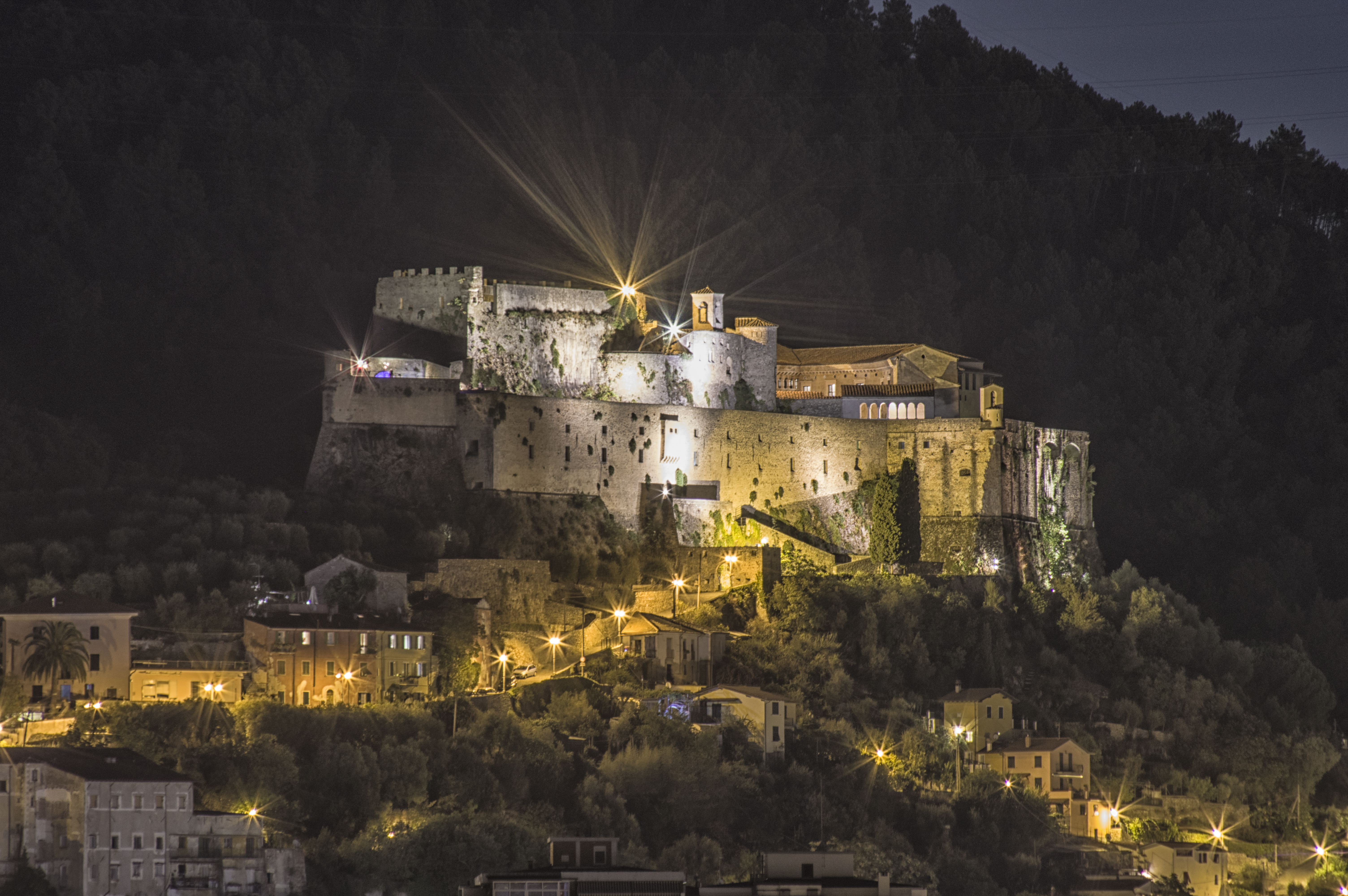 Rocca Malaspina This is a photo of a monument which is part of cultural heritage of Italy.